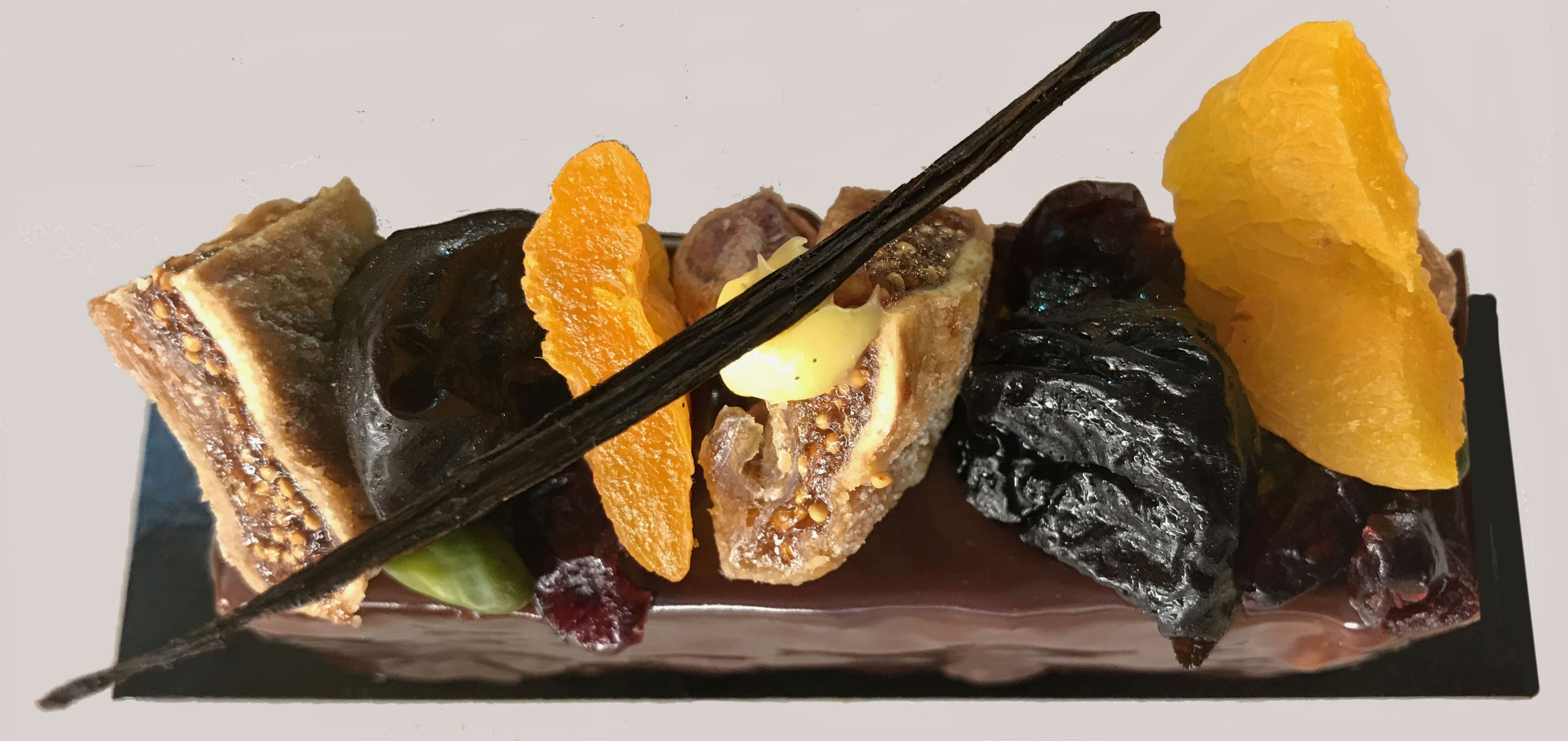 Patisserie (Ian Baker)